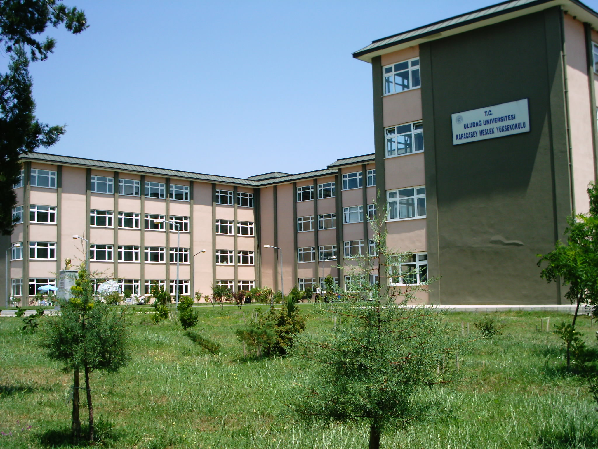 Tarafımdan çekilmiştir.